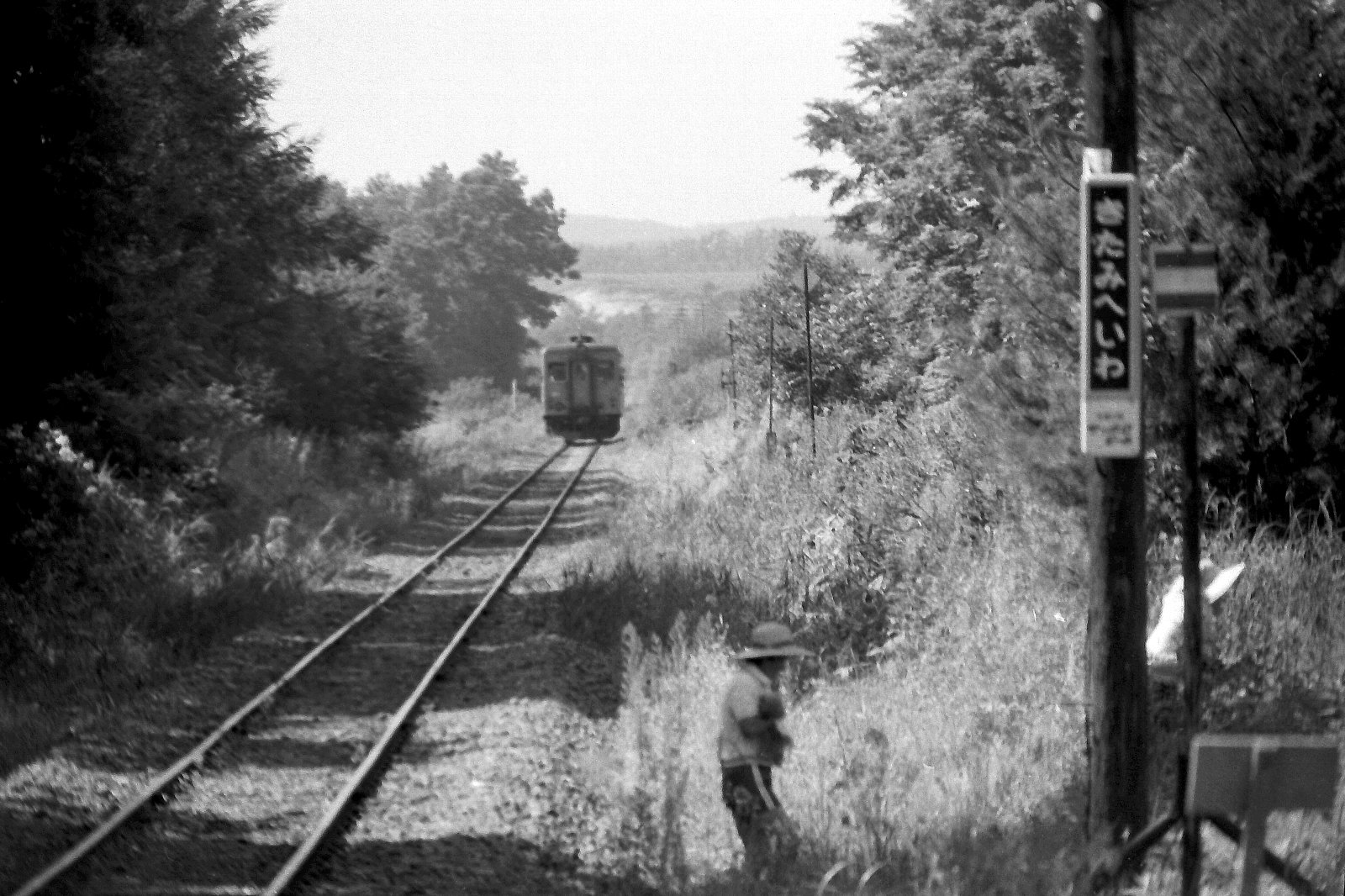 北見平和駅に到着する湧網線普通列車